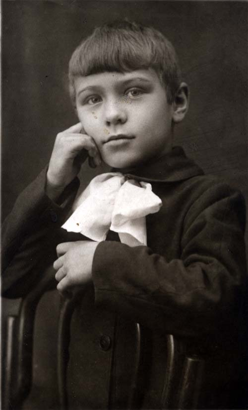 Витя Балашов, январь 1931 года